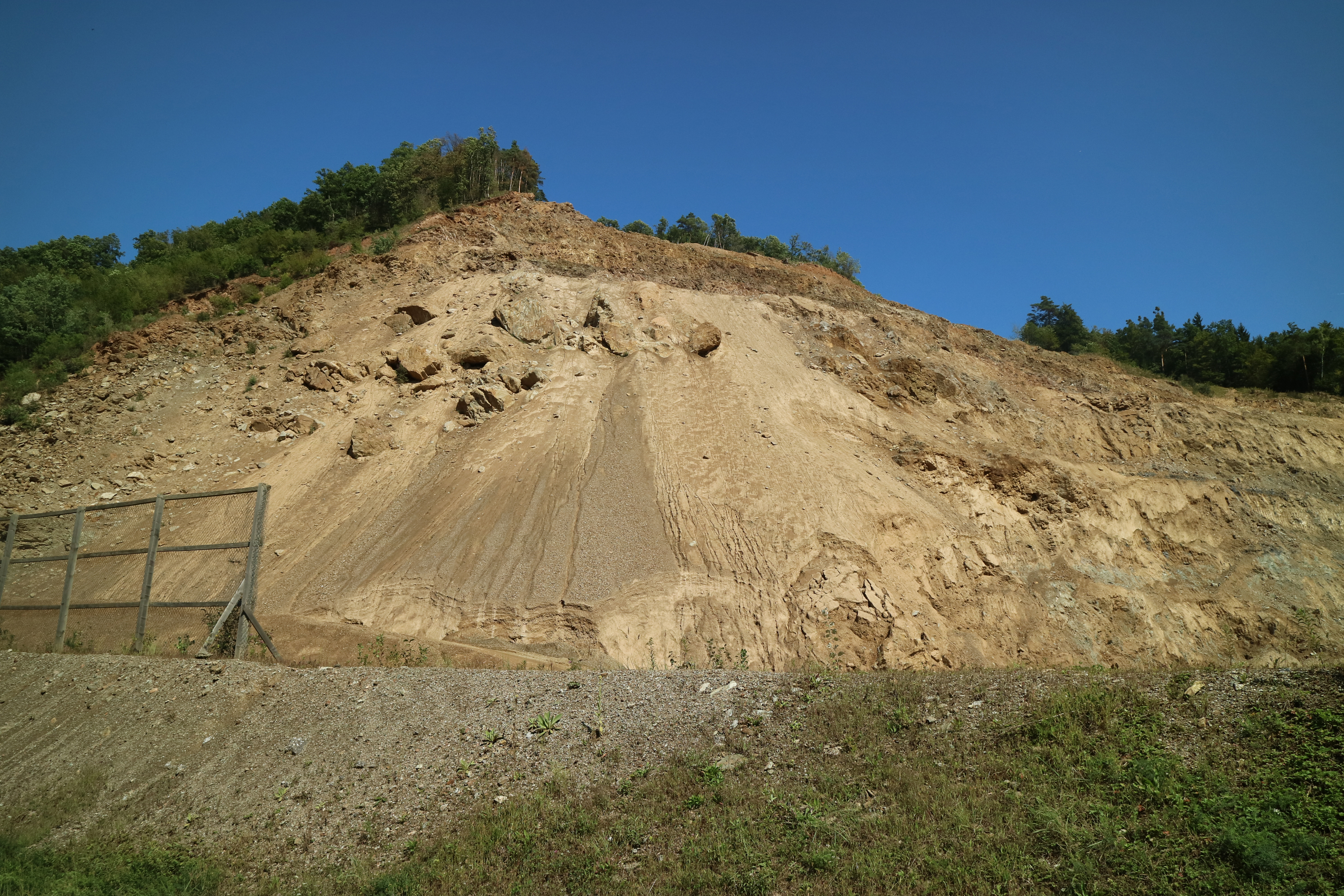 Steinbruch am Sotinski breg (Stadelberg) in der slowenischen Region Prekmurje